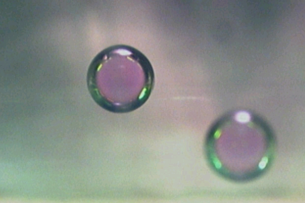 Photographie de deux antibulles (antibubbles) lors d'une de mes expériences en compagnie d'Antoine Confavreux. Les deux antibulles se retrouvent immergées sous l'eau et prisonnières entre deux liquides de densités différentes (eau pure + savon et eau salée + savon). La méthode consiste à créer un gradient de densité de liquides savonneux et à jeter des gouttes d'eau savonneuses de densité égale au liquide le plus dense du bocal. Ainsi, après formation de l'antibulle (bulle de liquide contournée d'un film d'air), celle-ci restera coincée à la limite des deux liquides du bocal, juste au dessus de la phase de densité égale au liquide contenu dans l'antibulle. Ici, les deux antibulles furent colorées d'un simple colorant alimentaire rouge pour l'étude de leur mort.